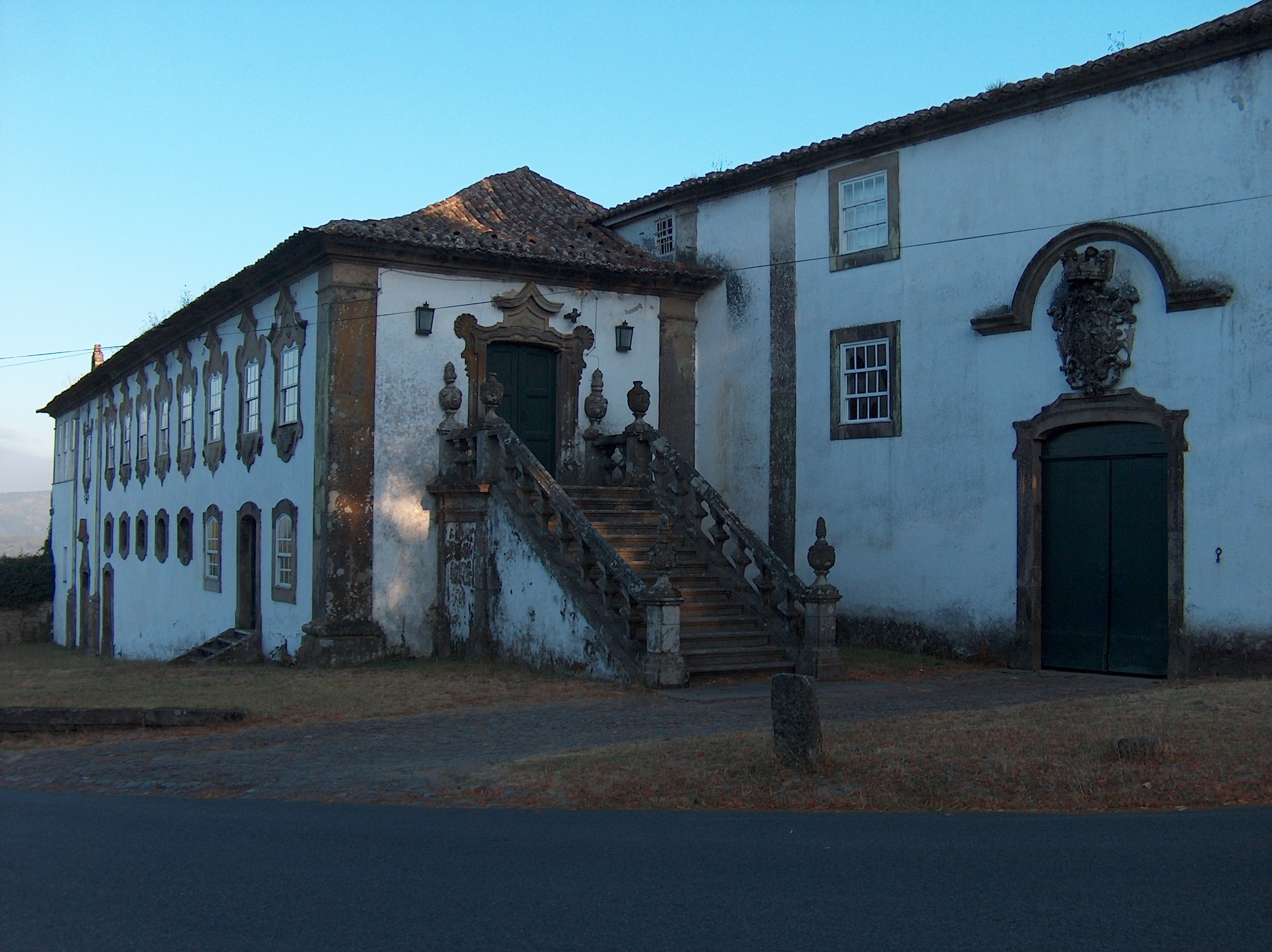 Descrição Vista geral do Solar dos Malafaias (Serrazes). Fonte Carregada pelo autor Autor João Carvalho